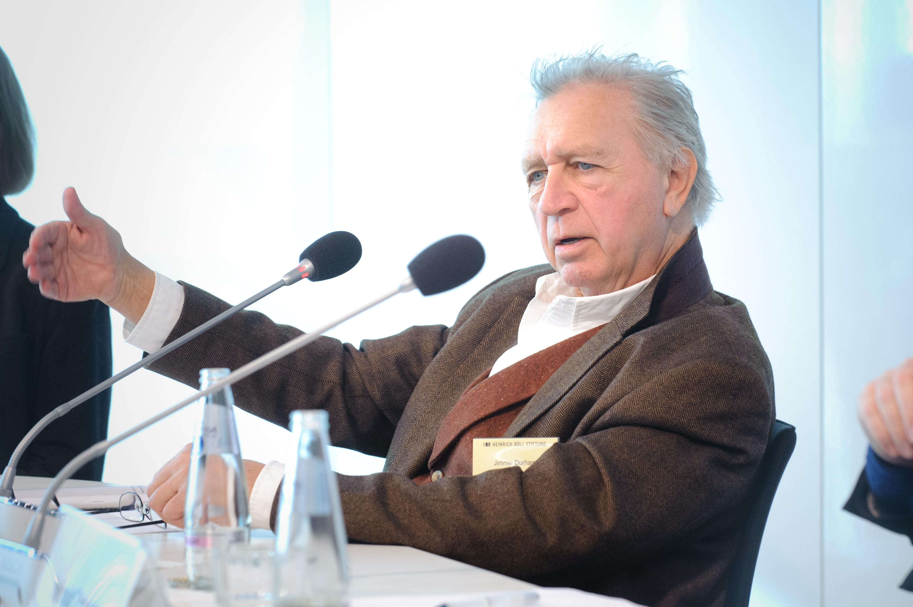 Jimmie Durham (Visual Artist, Berlin/Rome) radius of art - Konferenz Foto: Stephan Röhl